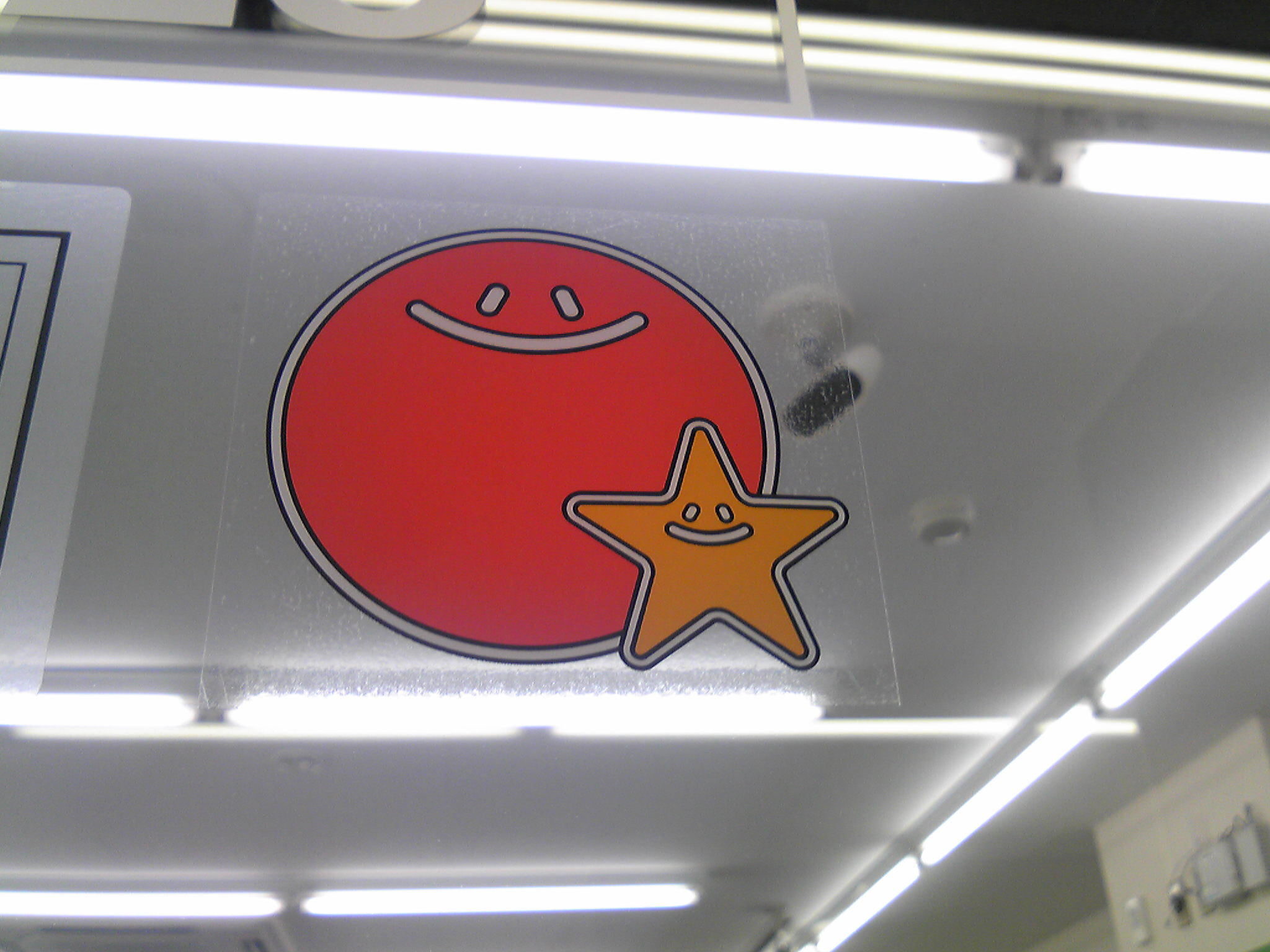 ファミリーマートのニコちゃんマーク